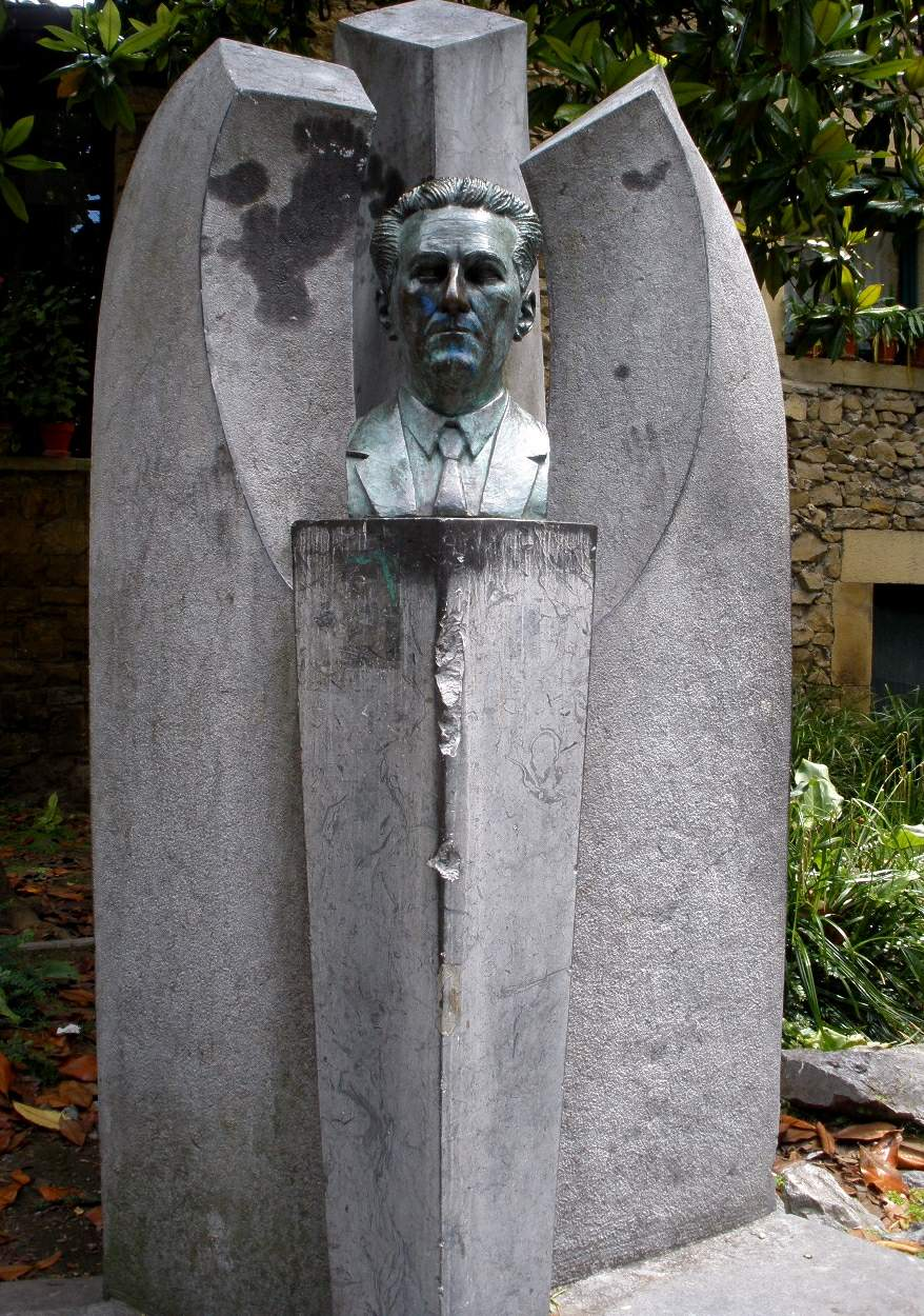 Zarauz - Monumento a Xavier Lizardi